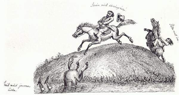 Andrássy Manó karikatúrja - Széchenyi pályafutása. 1840-es évek (OSzK)